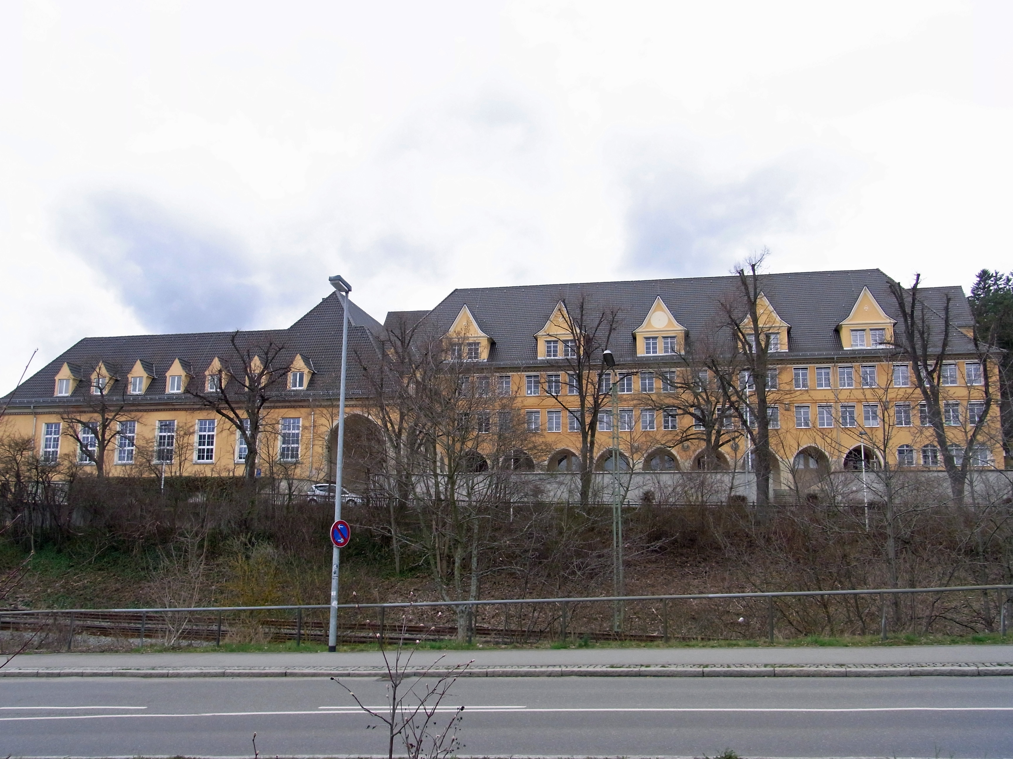 Balingen Sichelschule